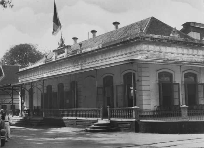 Foto. Soerabaja, het oude gebouw van de marinesociëteit Modderlust